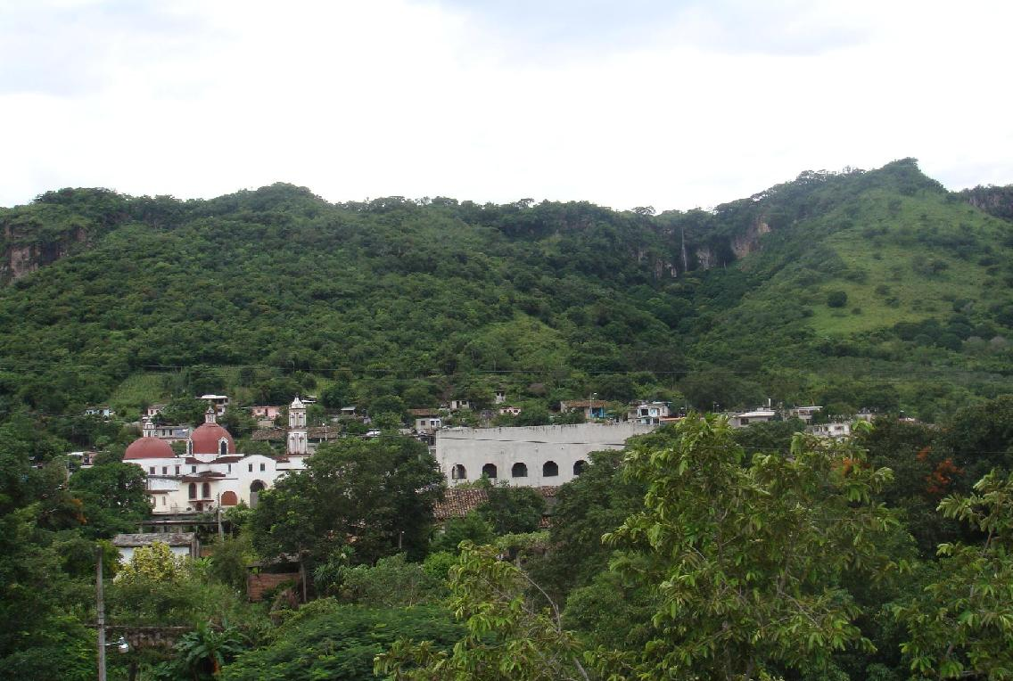 Un hermoso pueblo llamado Los Otates.